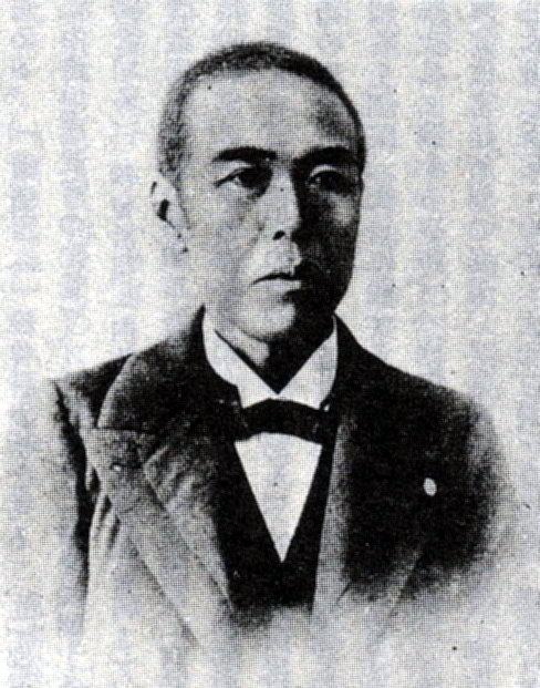 Naka Michiyo（那珂通世）was a historian of Japan in Meiji period.